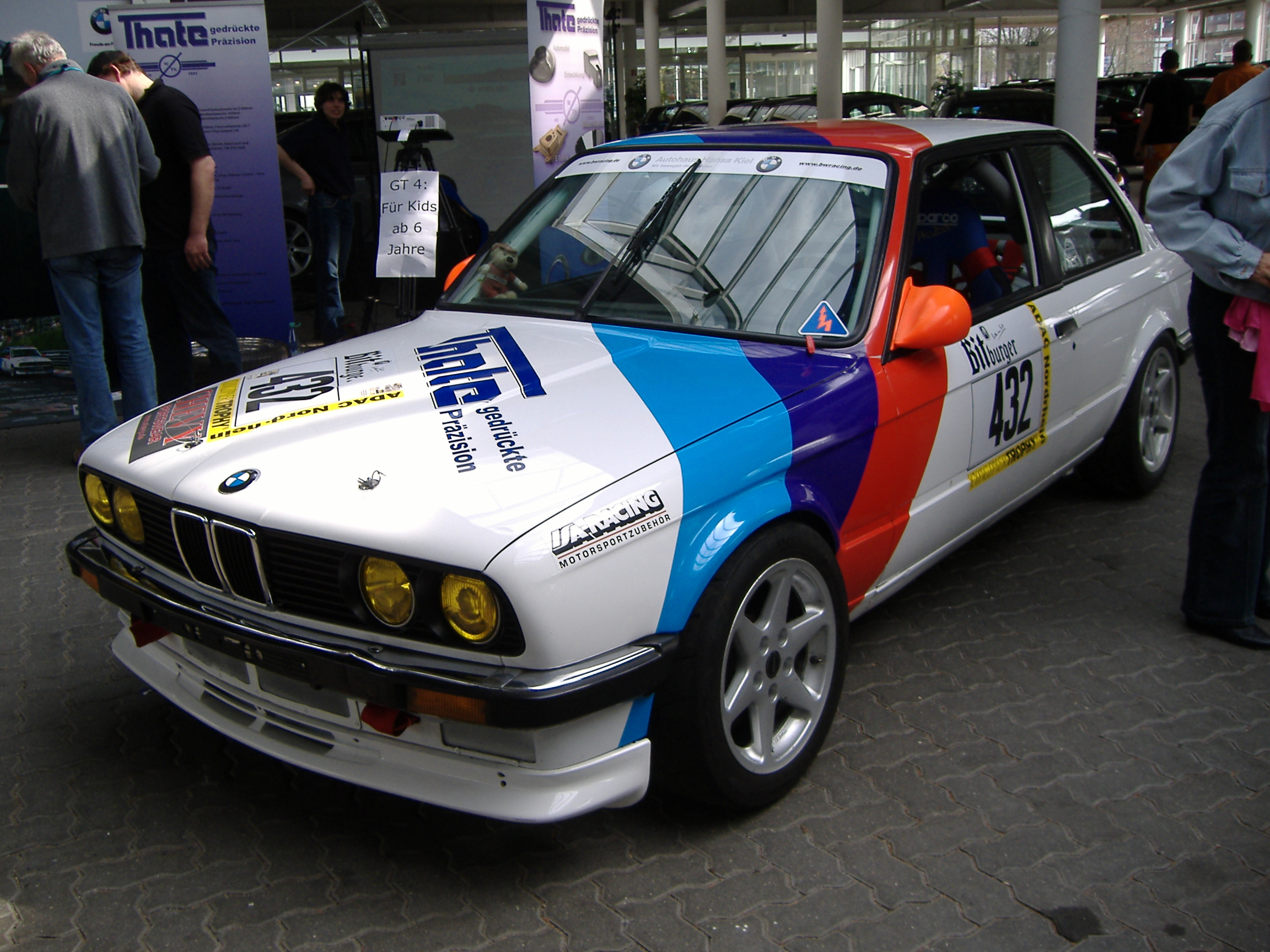 BMW E30 im Racetrim